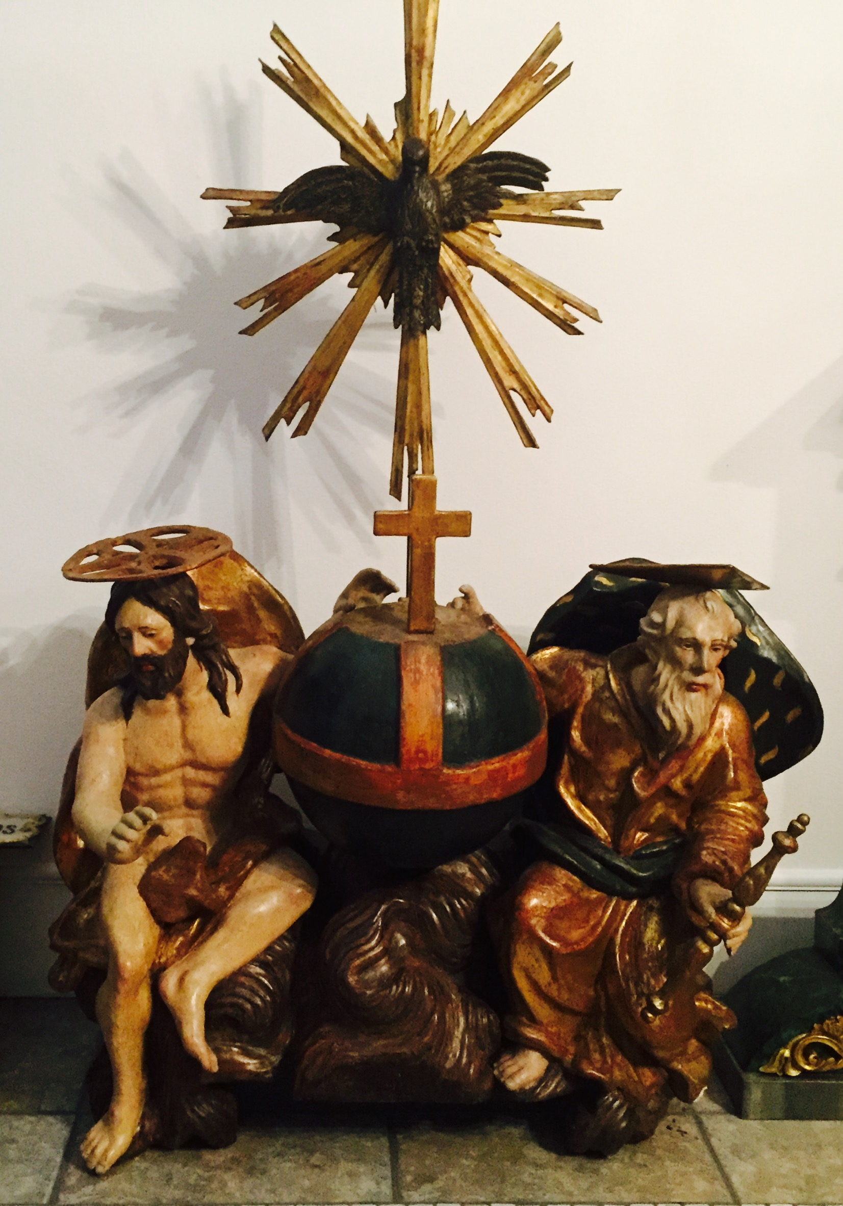 L’antico gruppo della Trinità